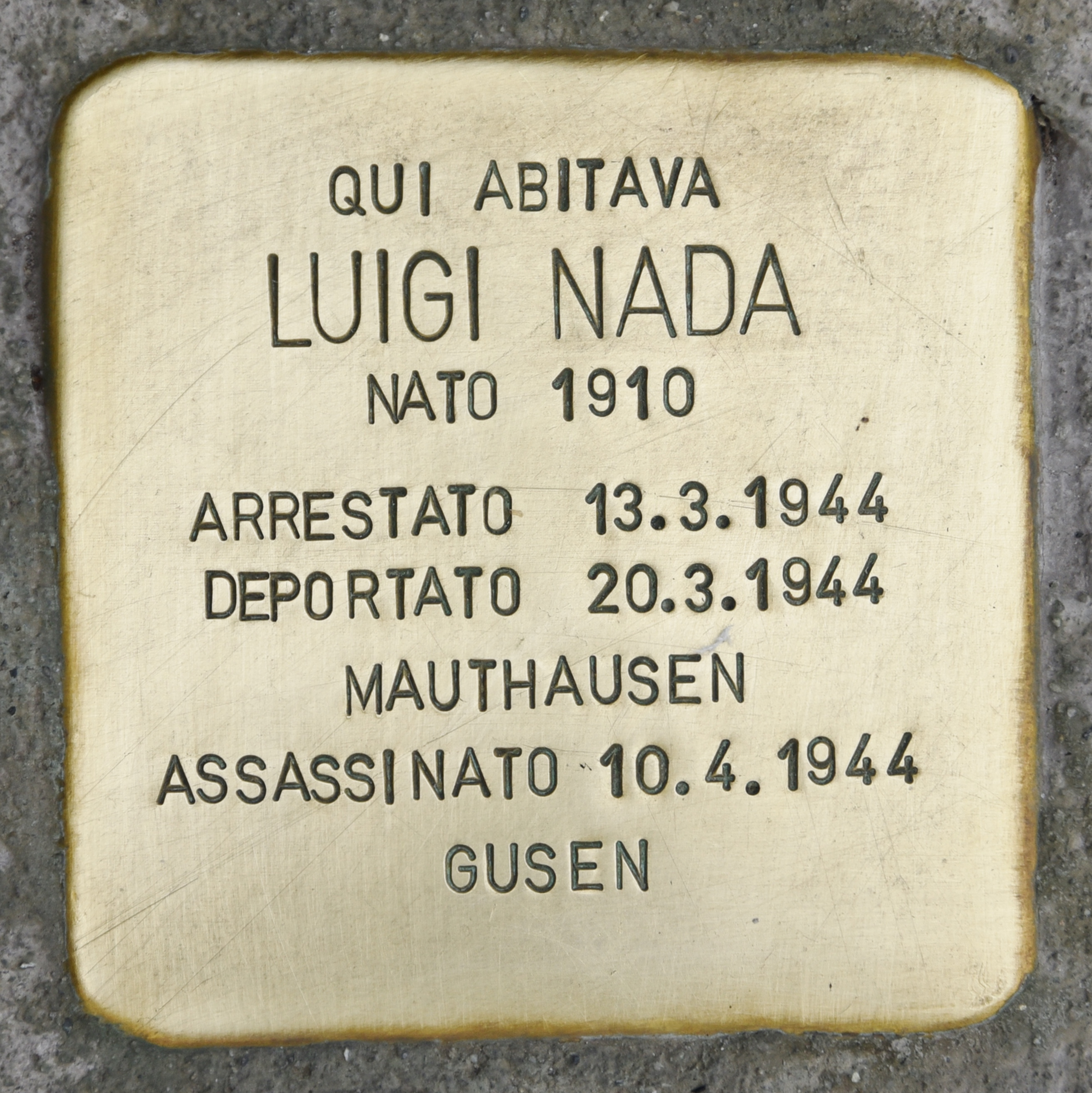 Stolperstein für Luigi Nada